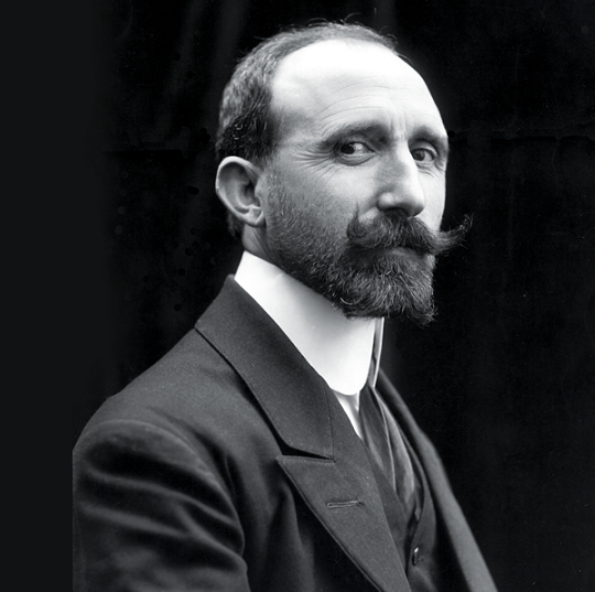 Nino Martoglio